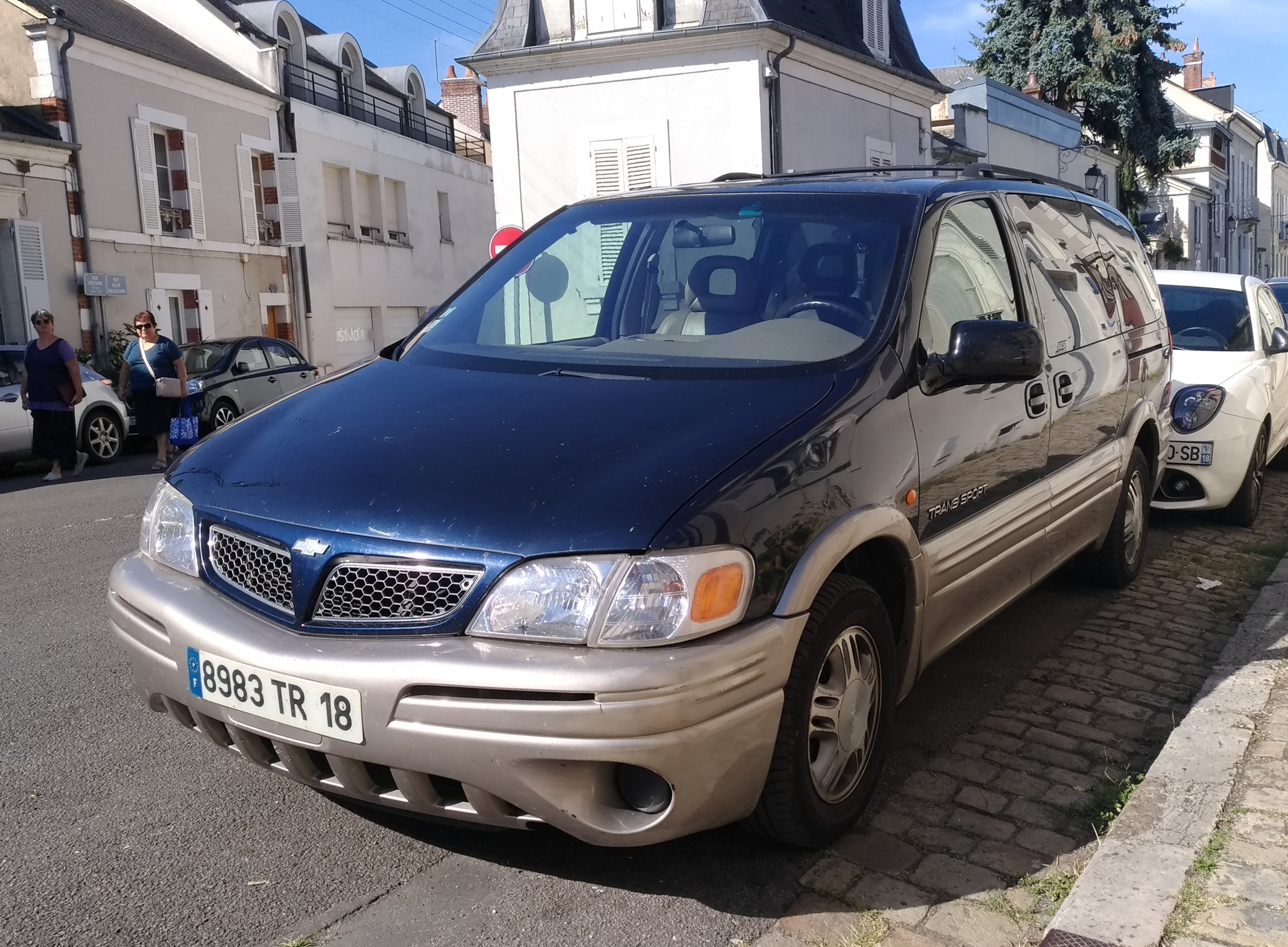 2001 Chevrolet Trans Sport (V6 3.4 184 hp) at Bourges